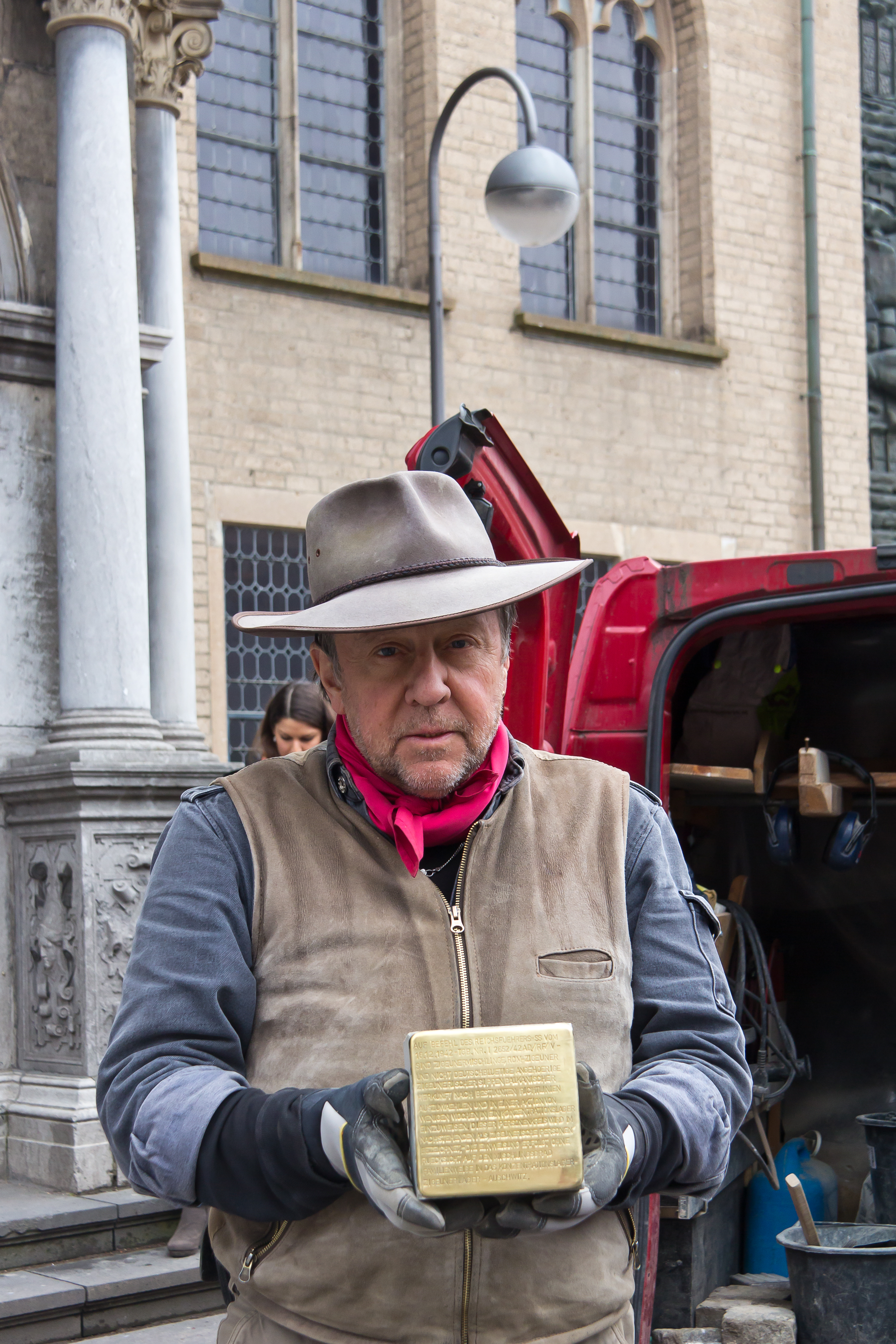 Verlegung eines Stolpersteins durch Günter Demnig vor dem Historischen Rathaus von Köln zur Erinnerung an den Befehl Heinrich Himmlers vom 16. Dezember 1942, die sogenannten „Zigeuner“ aus dem Deutschen Reich in das Konzentrations- und Vernichtungslager Auschwitz zu deportieren.